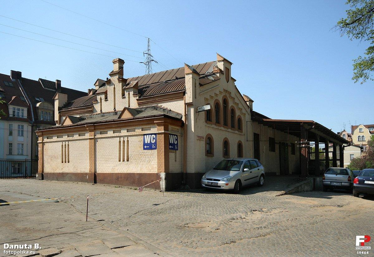 Budynek dworca na przystanku SKM. Torowisko z drugiej strony. Barbarzyńcy pomalowali klinkierową elewację.